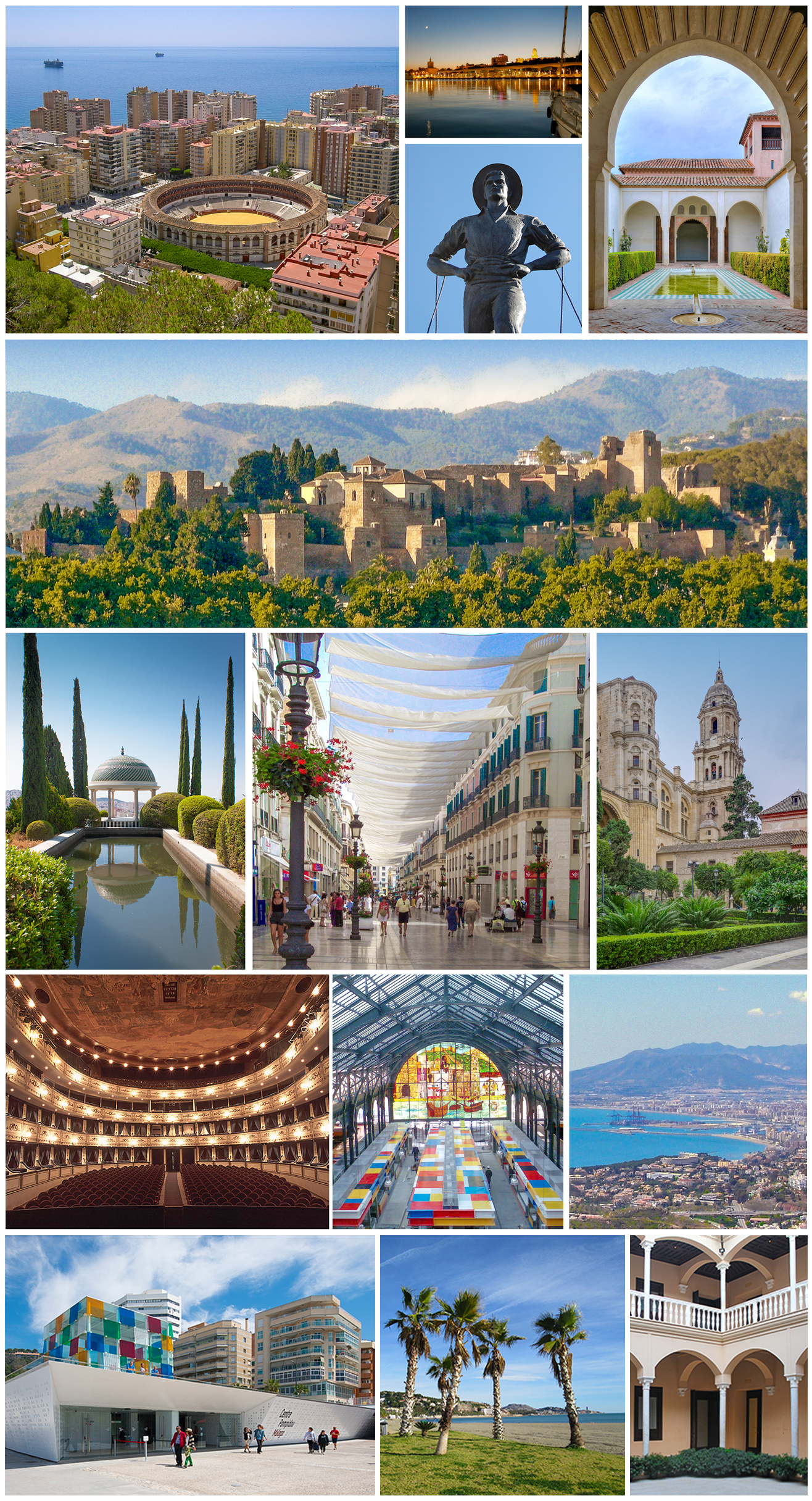 Fotografías representativas de la ciudad de Málaga